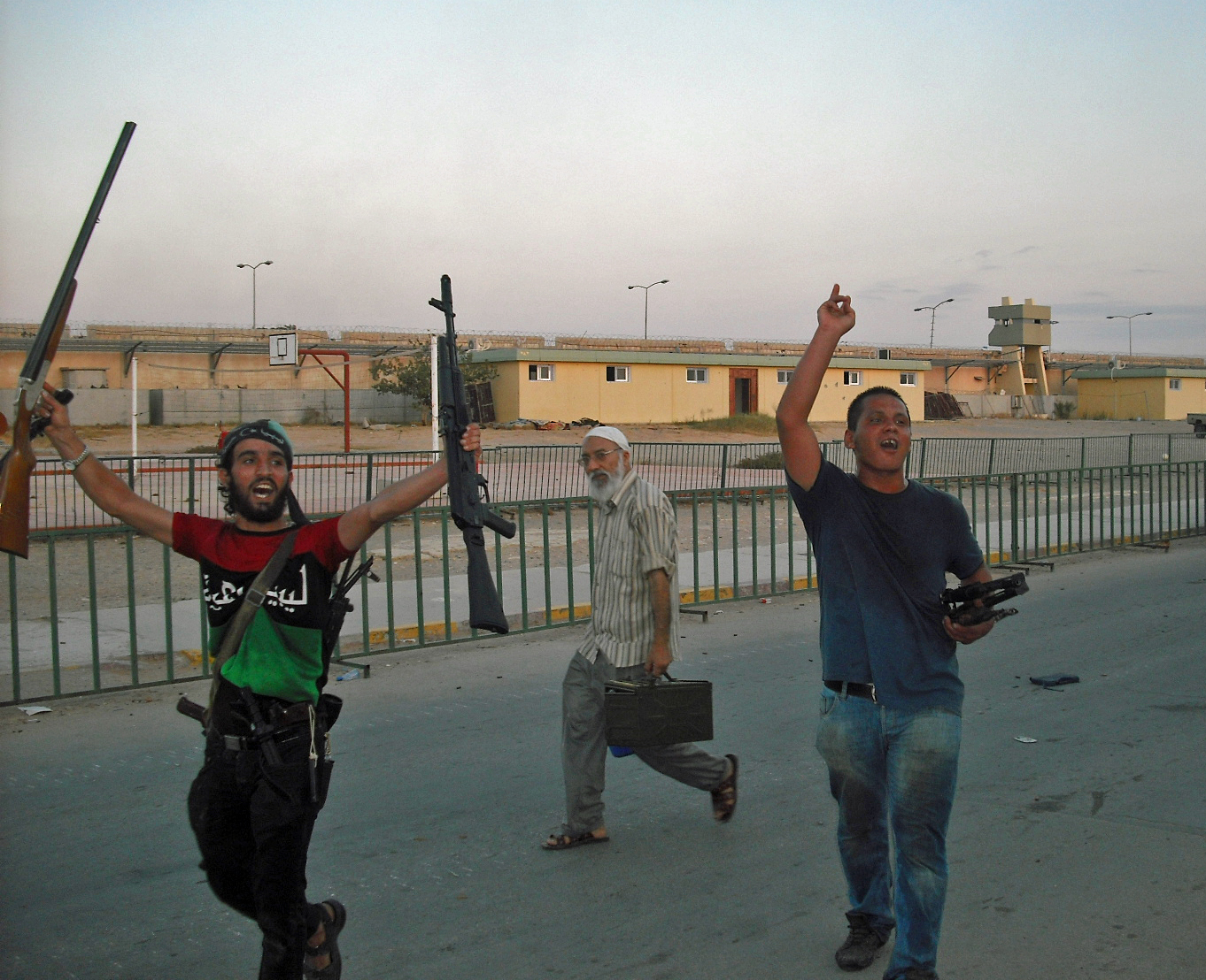 Revolutionaries celebrate in Bab al-Aziziya. Full story: الثوار يحتفلون في باب العزيزية القصة Révolutionnaires célèbrent à Bab al-Aziziya. L'article